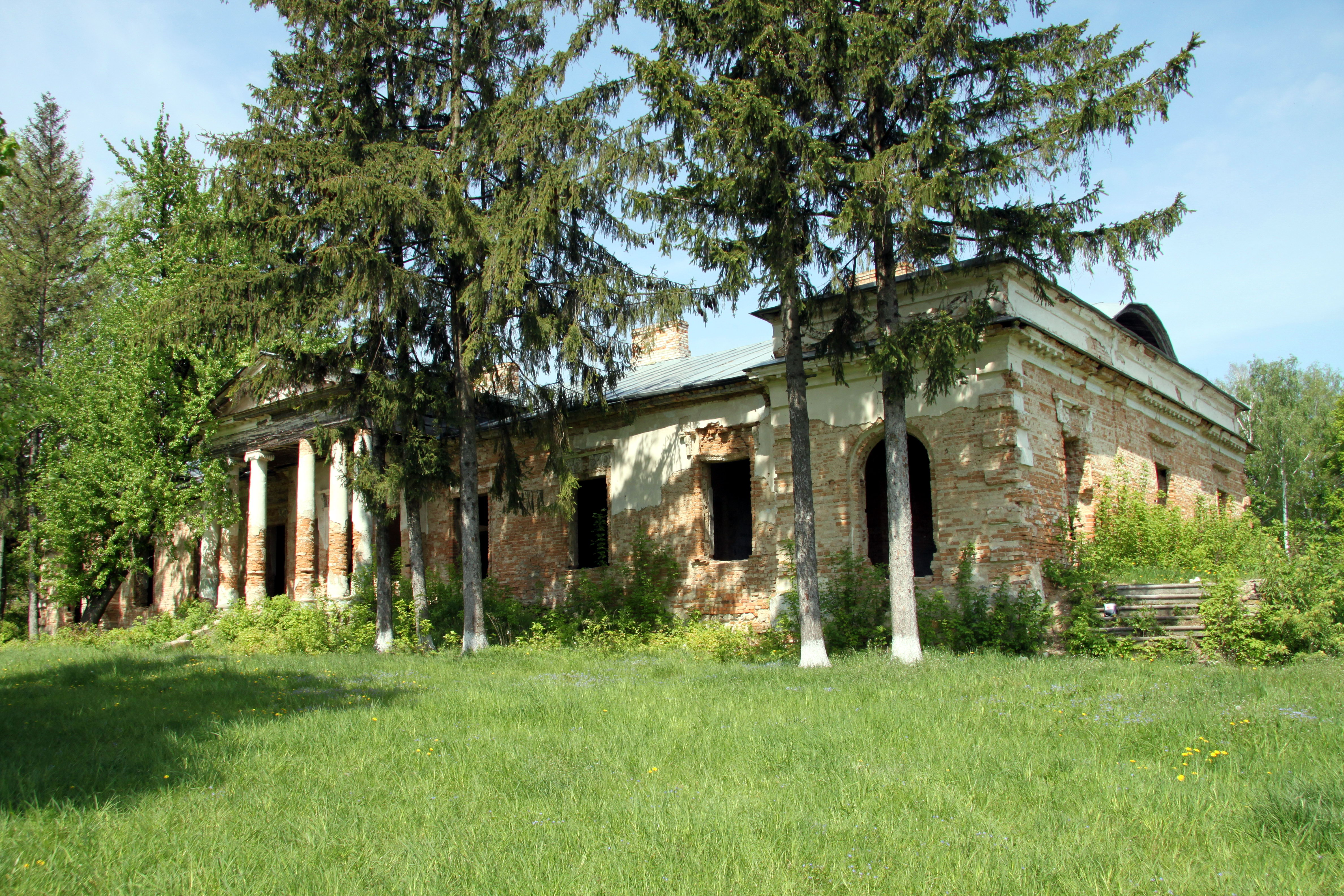 Садиба Ланге, вул. Новоселів, 3, Нападівка